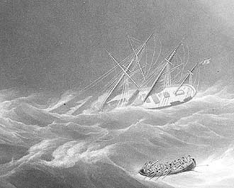 Le paquebot Isis de la Royal Mail Steam Packet Company, pris dans une tempête et endommagé en Atlantique en 1842